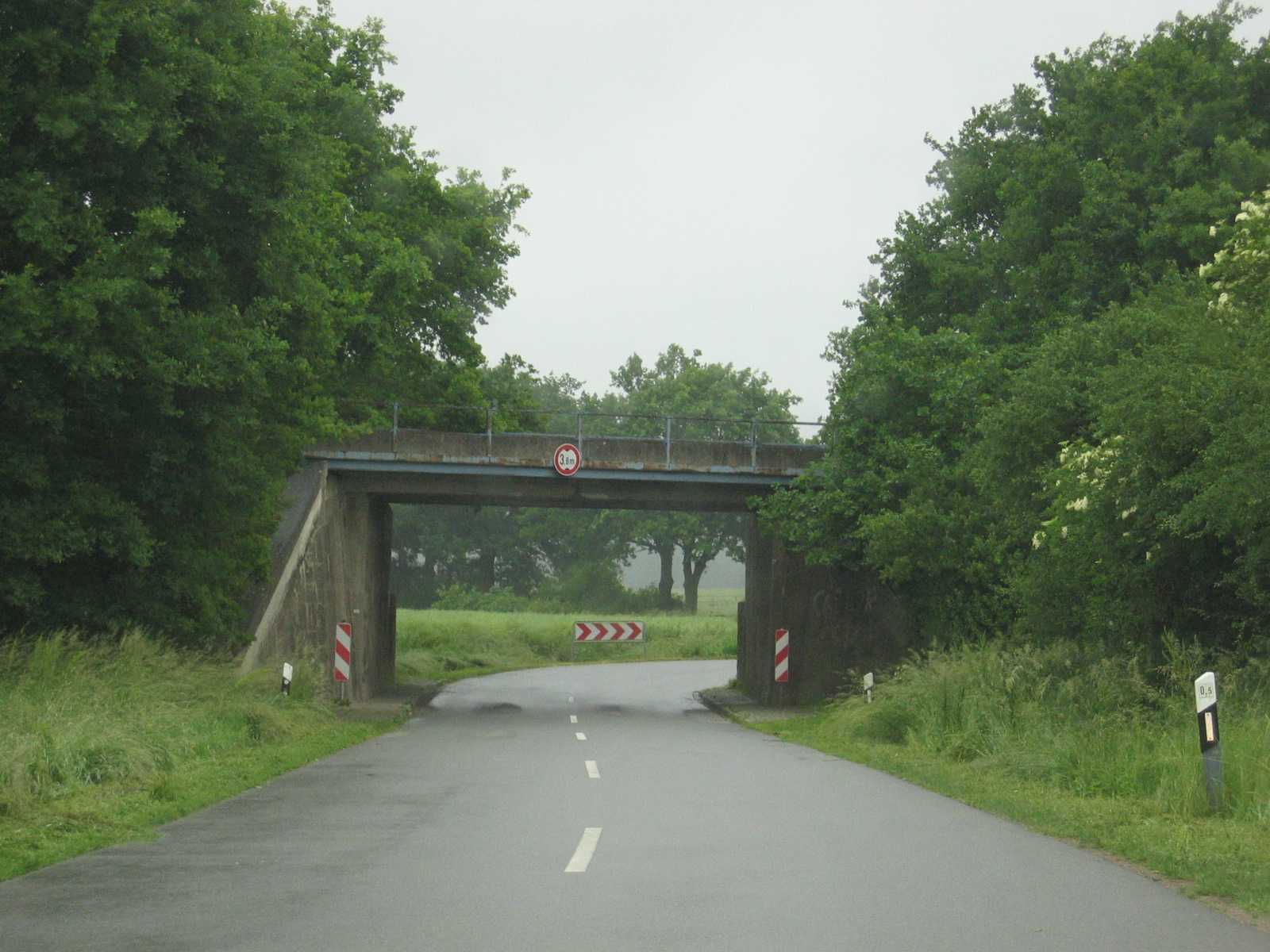 Straßendurchlaß östlich von Oetzen (Straße nach Weste)